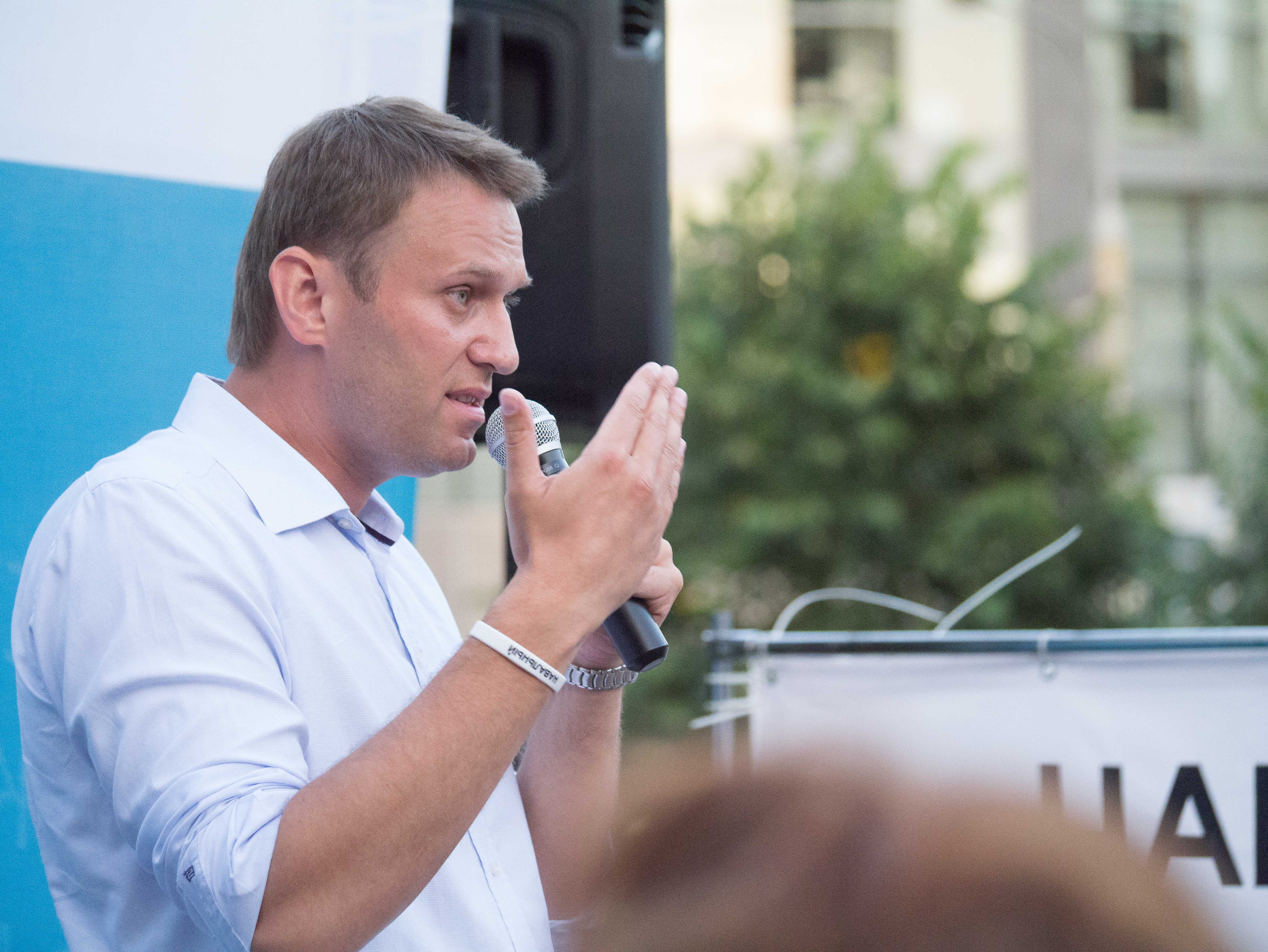 Встреча с избирателями на выборах мэра Москвы 2013 года